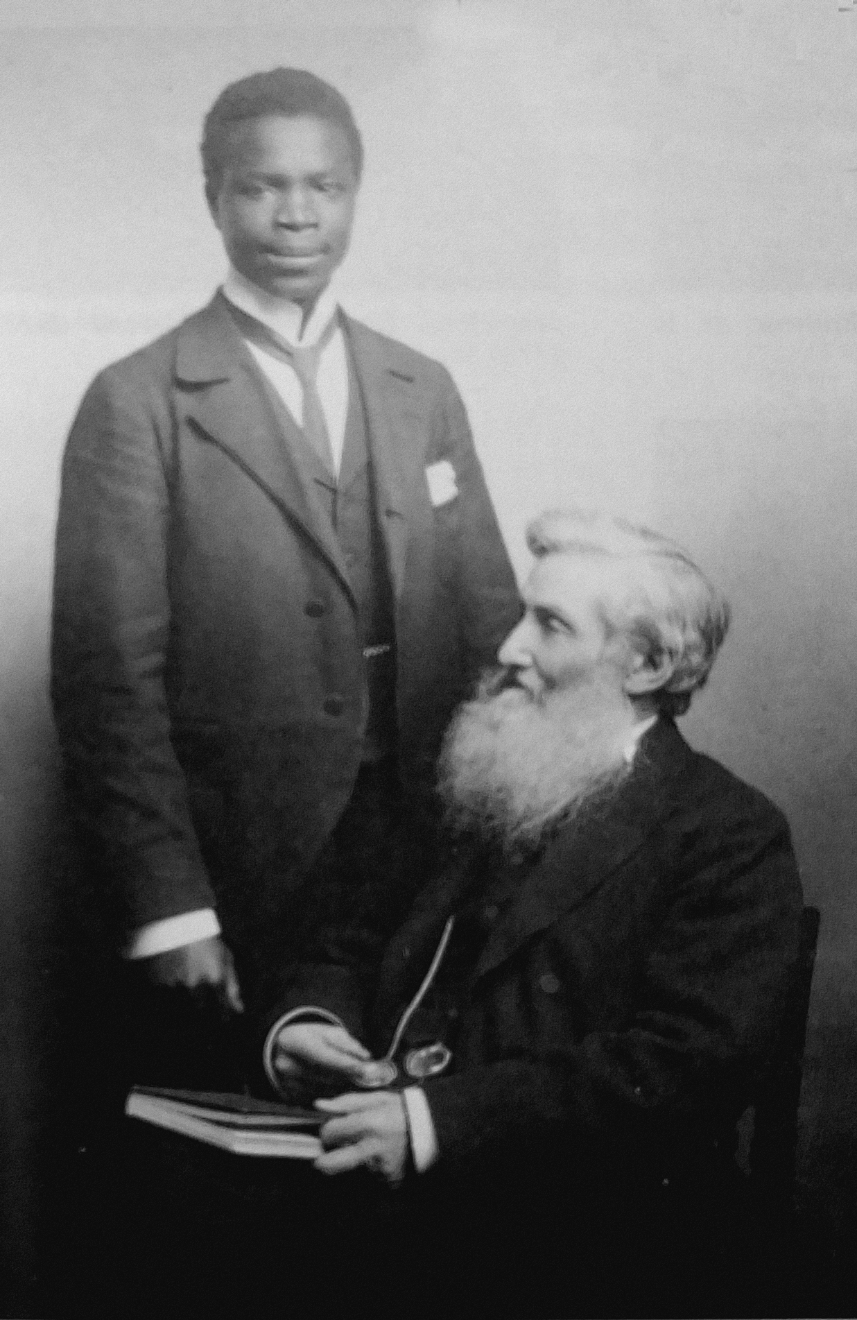 François Coillard ((1834-1904) en compagnie de Steven-Etienne Semondji à Paris en 1898. Photographe inconnu, archives du DEFAP (Département évangélique français d'action apostolique).